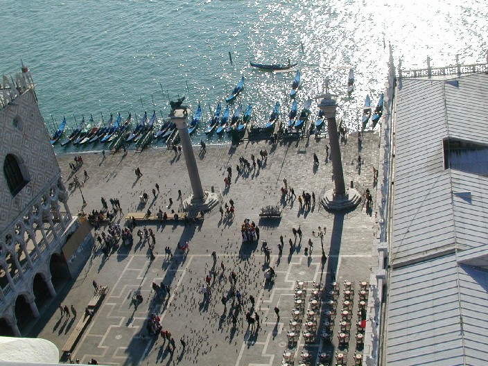 Piazza San Marco dal campanile. La foto è stata scattata il 4 novembre 2001 a Venezia (Italia). Categoria:Immagini di Venezia